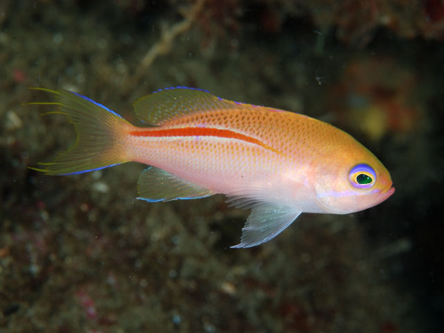 イトヒキコハクハナダイ♀ Pseudanthias rubrolineatus